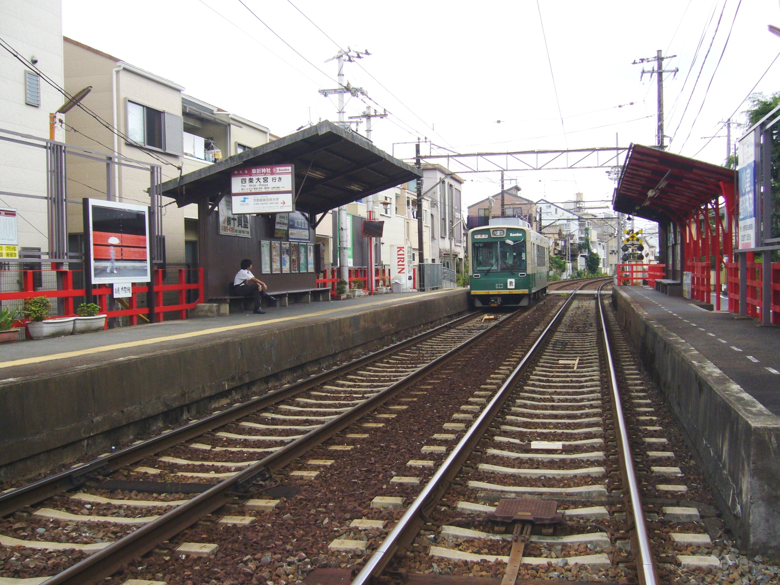 京福電気鉄道嵐山本線車折神社駅。9月下旬に色が塗り直された。出発して行くのは教習車。駅のすぐ嵐山駅側の踏切から2007年10月3日に投稿者が撮影。